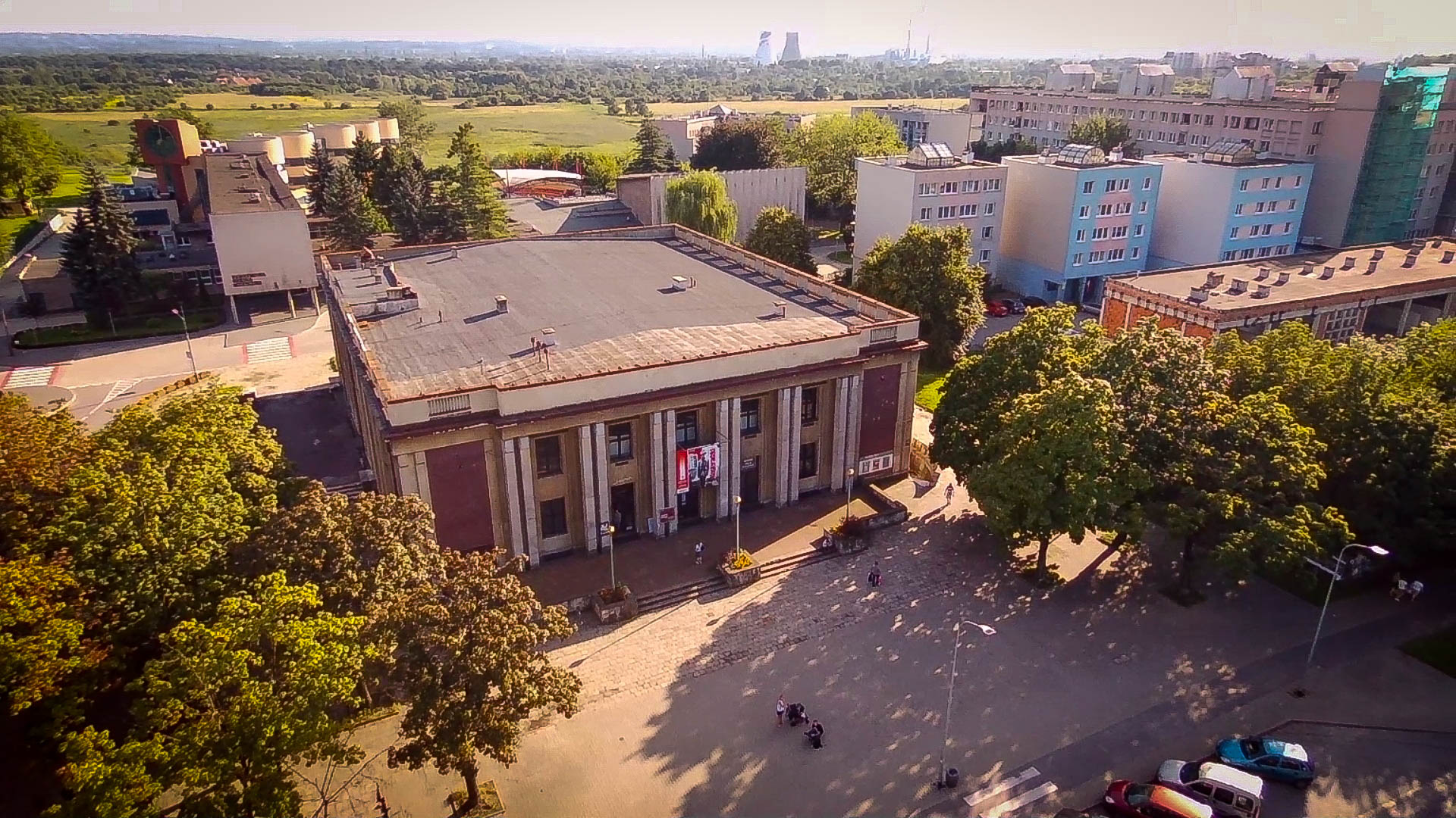 Gmach muzeum PRL w Nowej Hucie